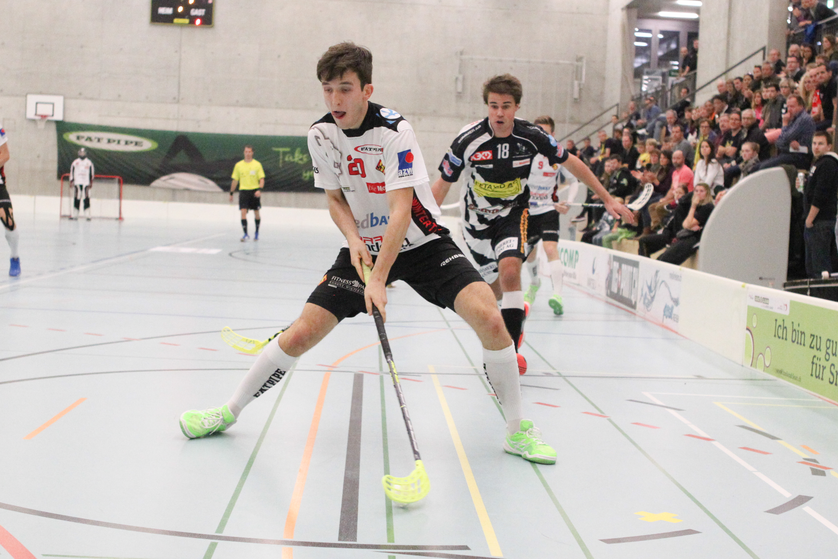 Unihockey Foto, HC Rychenberg, Saison 2013/2014, Winterthur, Felix Buff